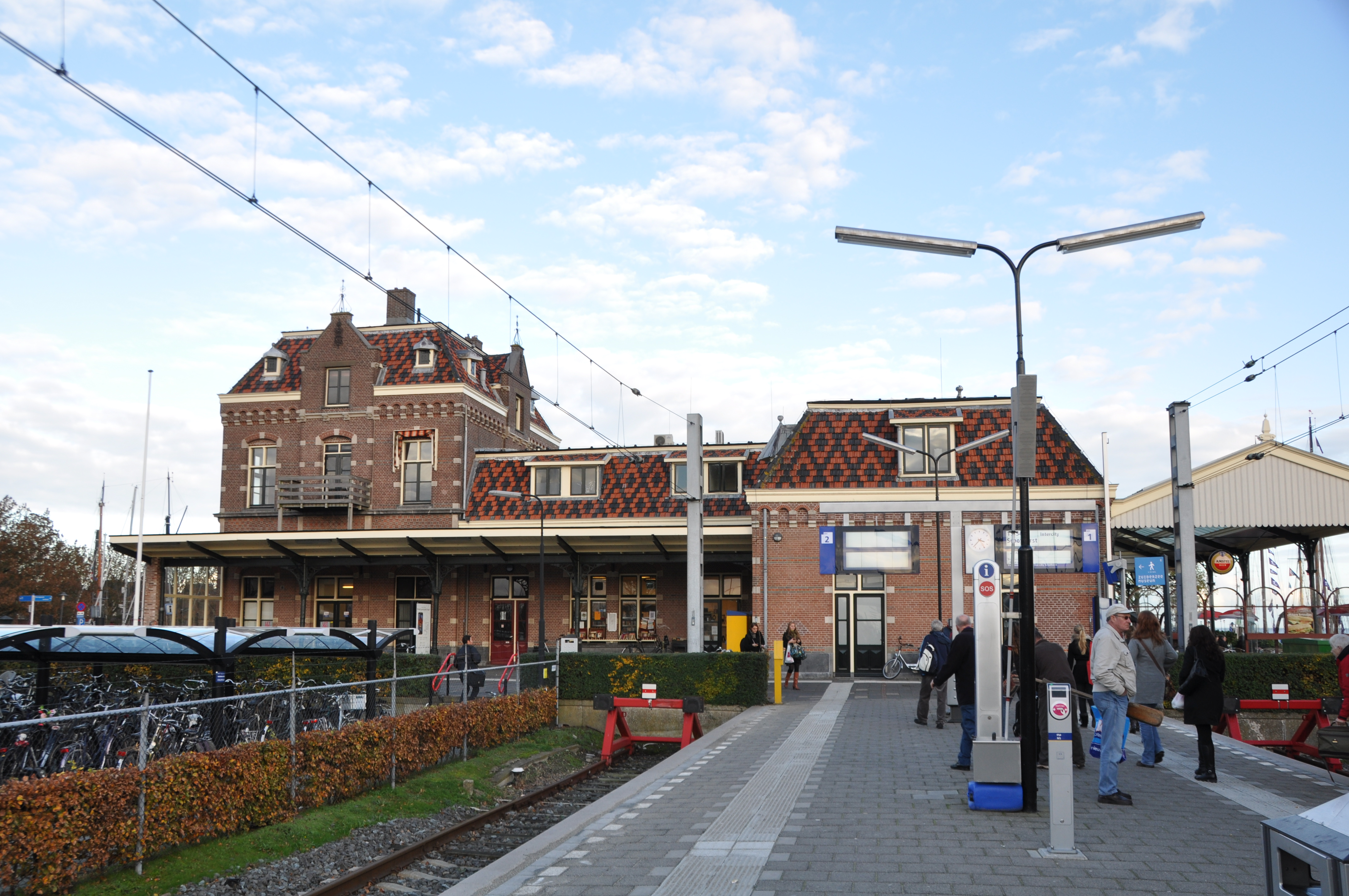 Station Enkhuizen.